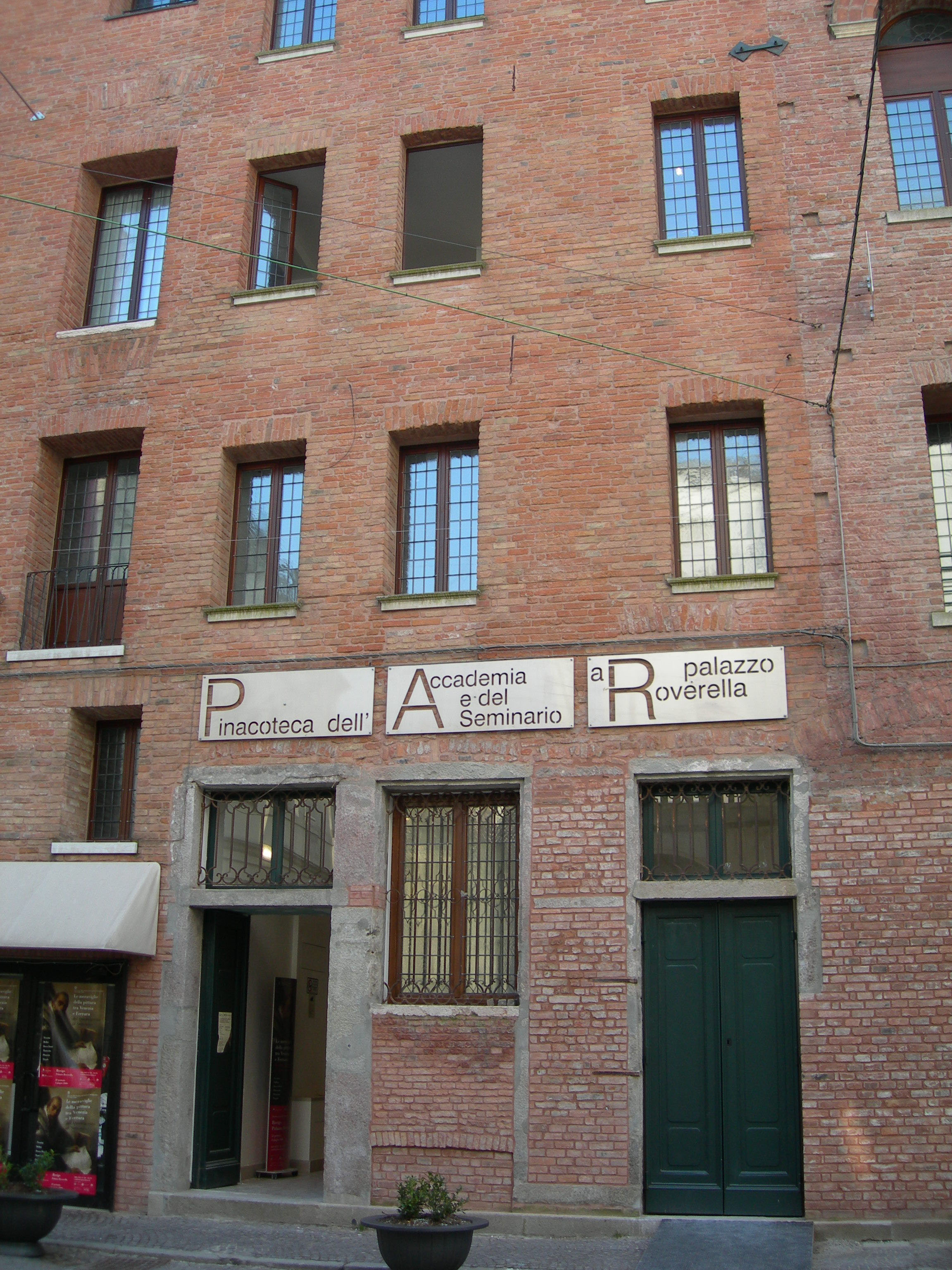 Facciata del palazzo Roverella che ospita la Pinacoteca dell'Accademia dei Concordi a Rovigo.